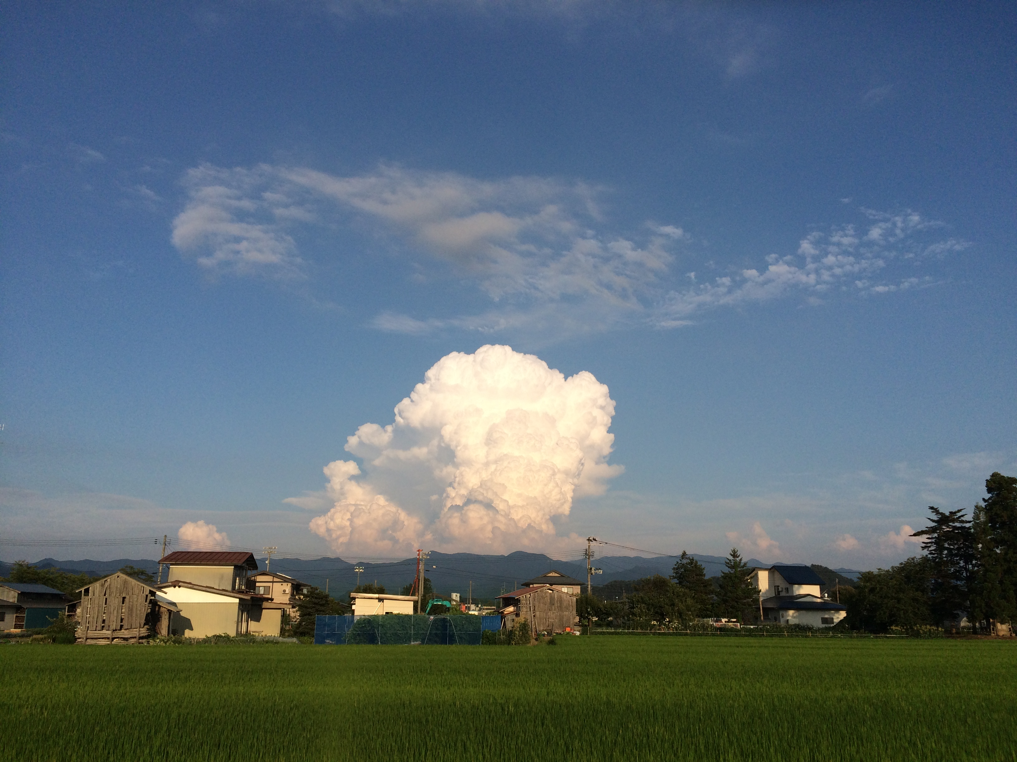 Cumulonimbus cloud